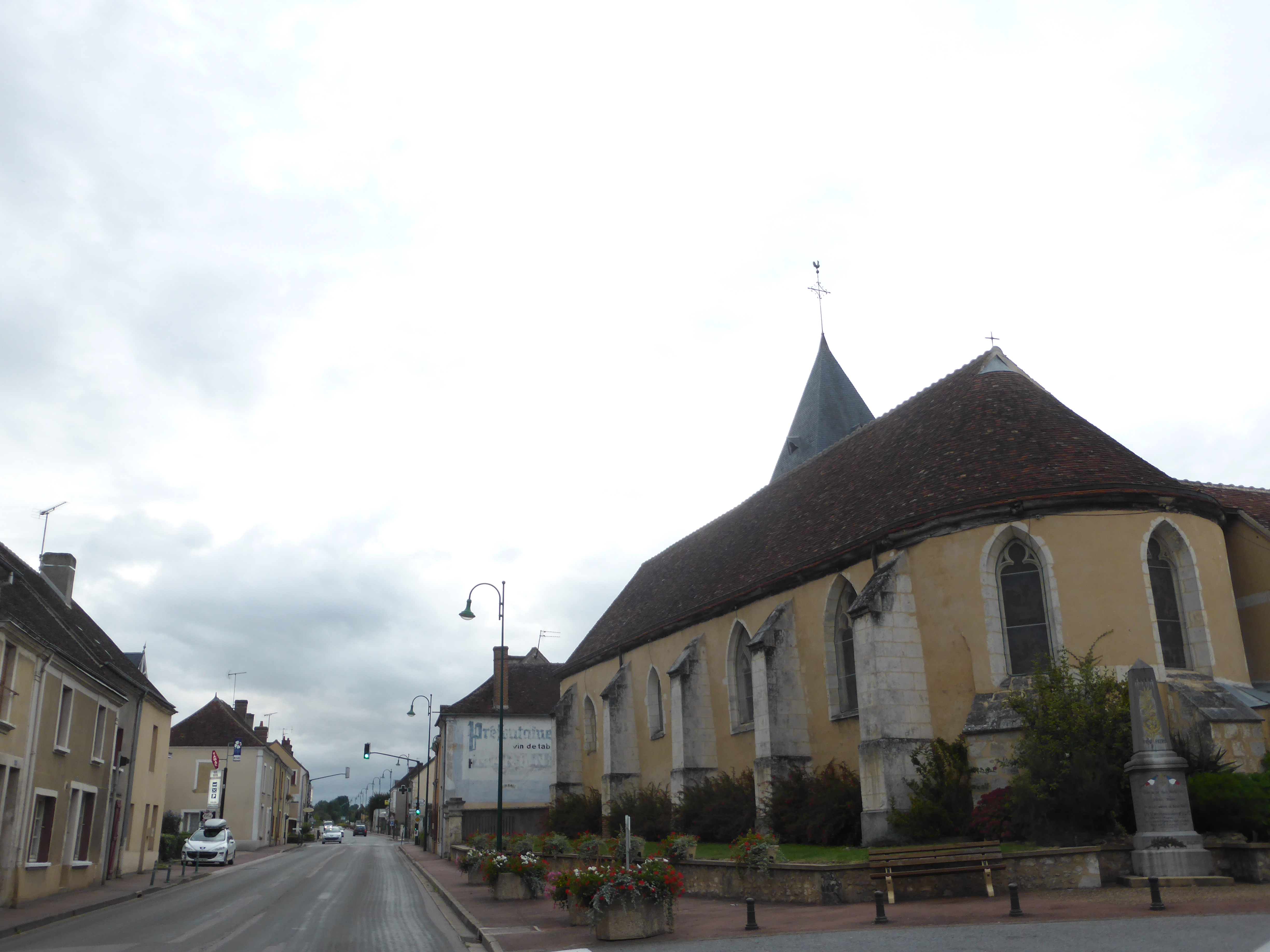 Rue principale et église Saint-Martin de Berd'huis, dans l'Orne.